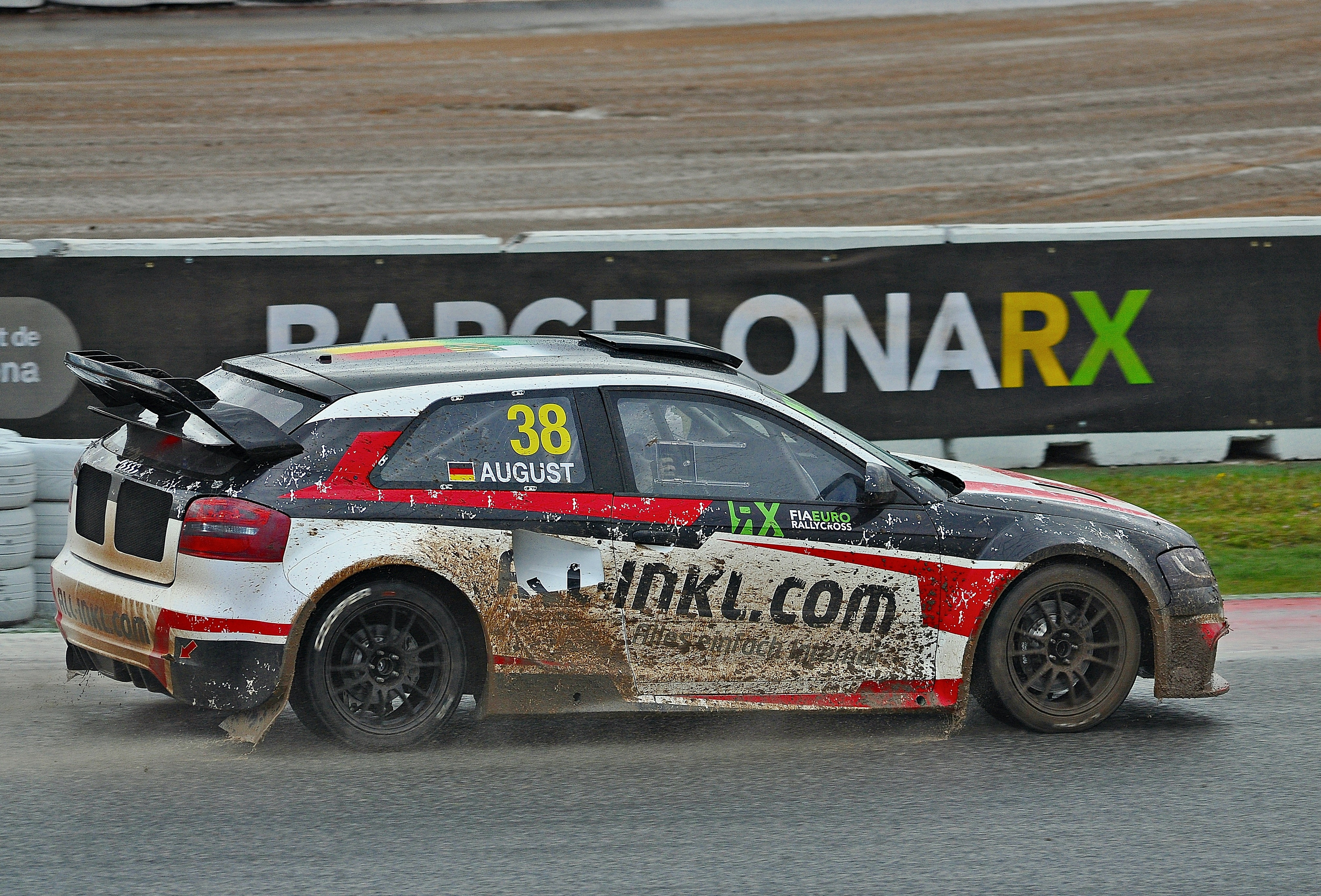 RX Barcelona